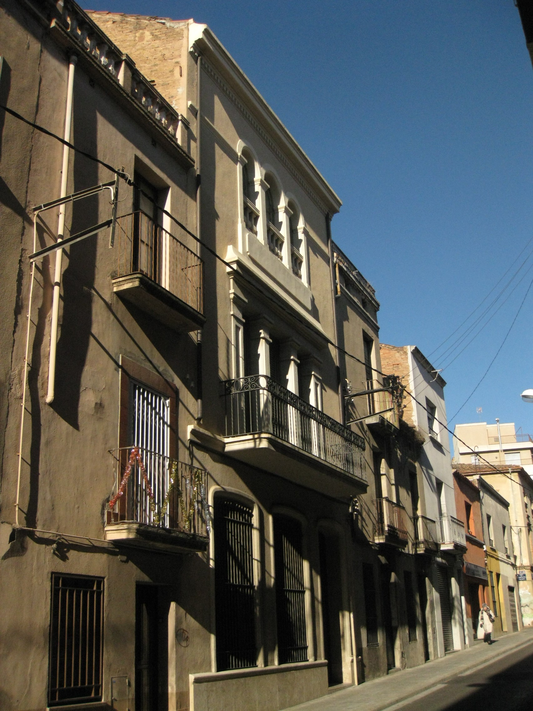 Carrer de Sant Antoni (Terrassa), amb la casa Eusebi Noguera al mig, al núm. 71-73. Obra de Lluís Muncunill de 1924.